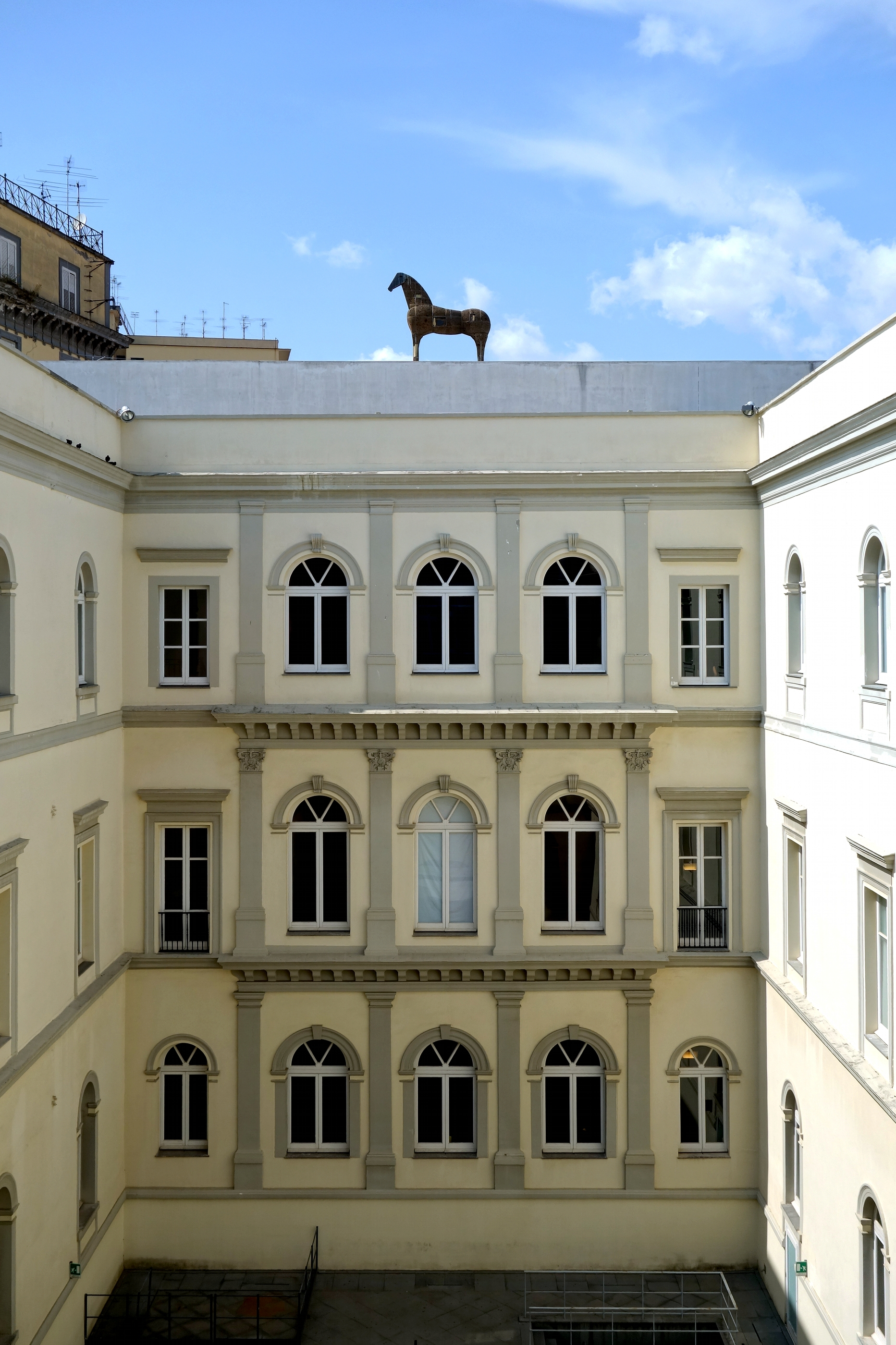 La cour intérieure du MADRE à Naples.